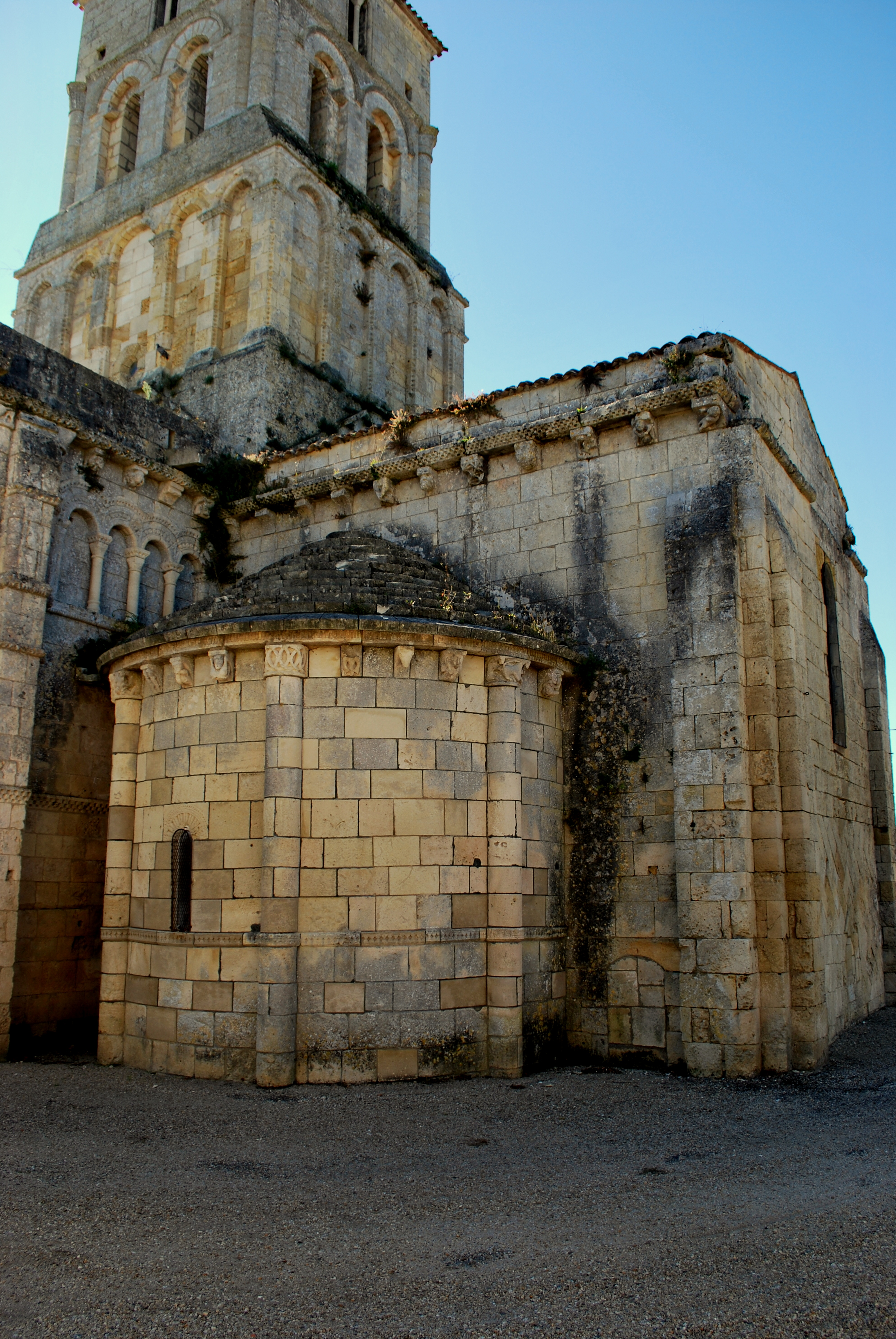 Église Saint-Pierre de Champagnolles